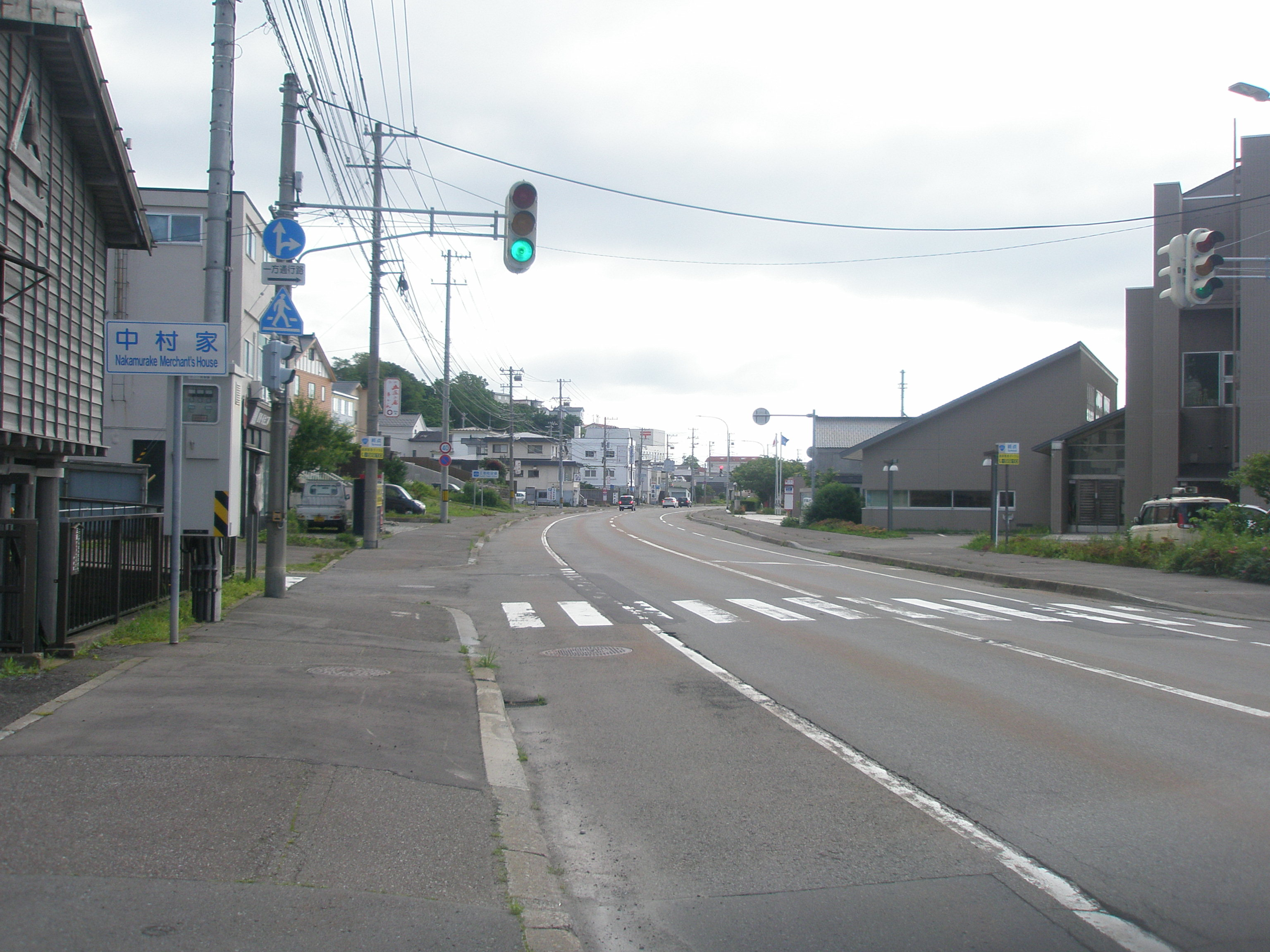 国道227号・終点（国道228号・終点と同一、起点側から見る）